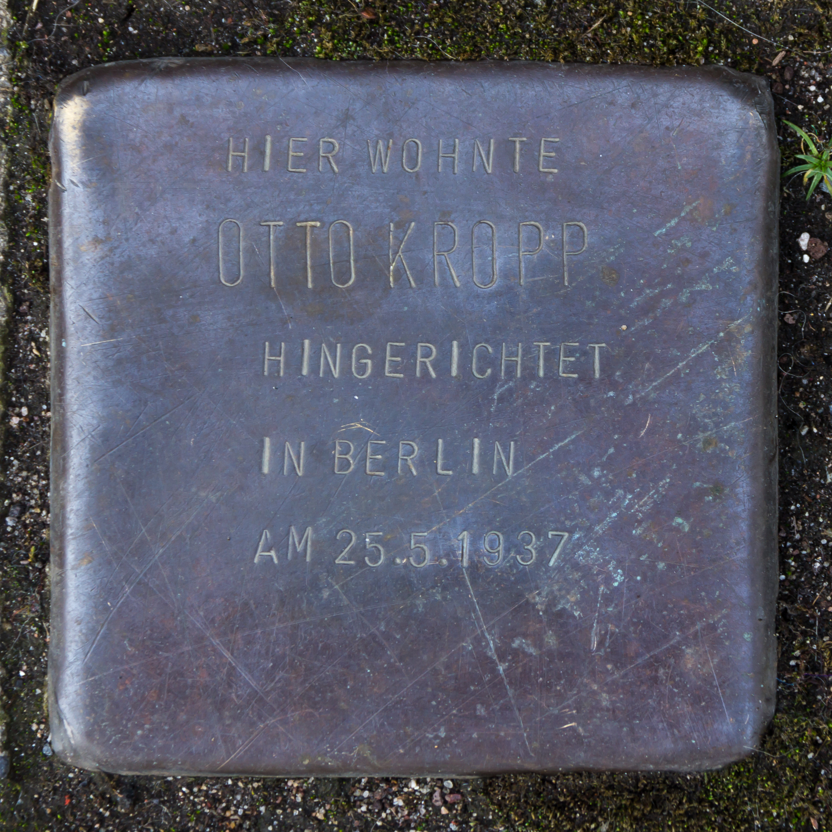 Stolperstein für Otto Kropp, Subbelrather Straße 412, Köln-Ehrenfeld Text: Hier wohnte Otto Kropp Hingerichtet in Berlin am 25.5.1937